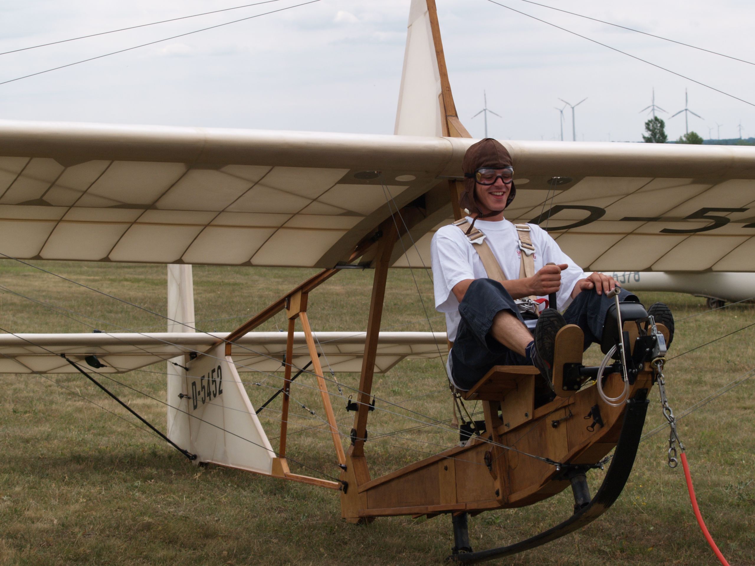 Schulgleiter SG38 am Flugsportzentrum Spitzerberg (Österreich)